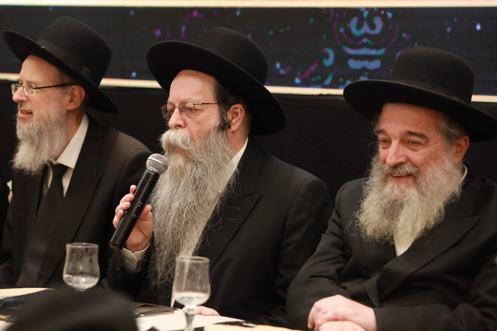 הגר"ש קניבסקי. הגר"י קרפ. הגר"ב רימר